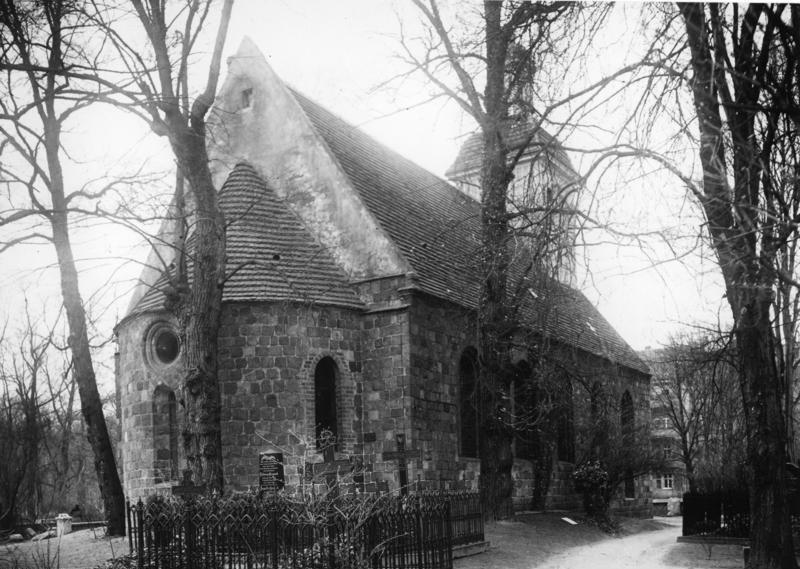 Aufnahme um 1930 Berlin - Tempelhof Die alte Dorfkirche, spätromanisch, vom Anfang des 13. Jahrhunderts. Nordostansicht. Sie enthält den Flügelalter mit dem Maryrium der Hl. Katharina.